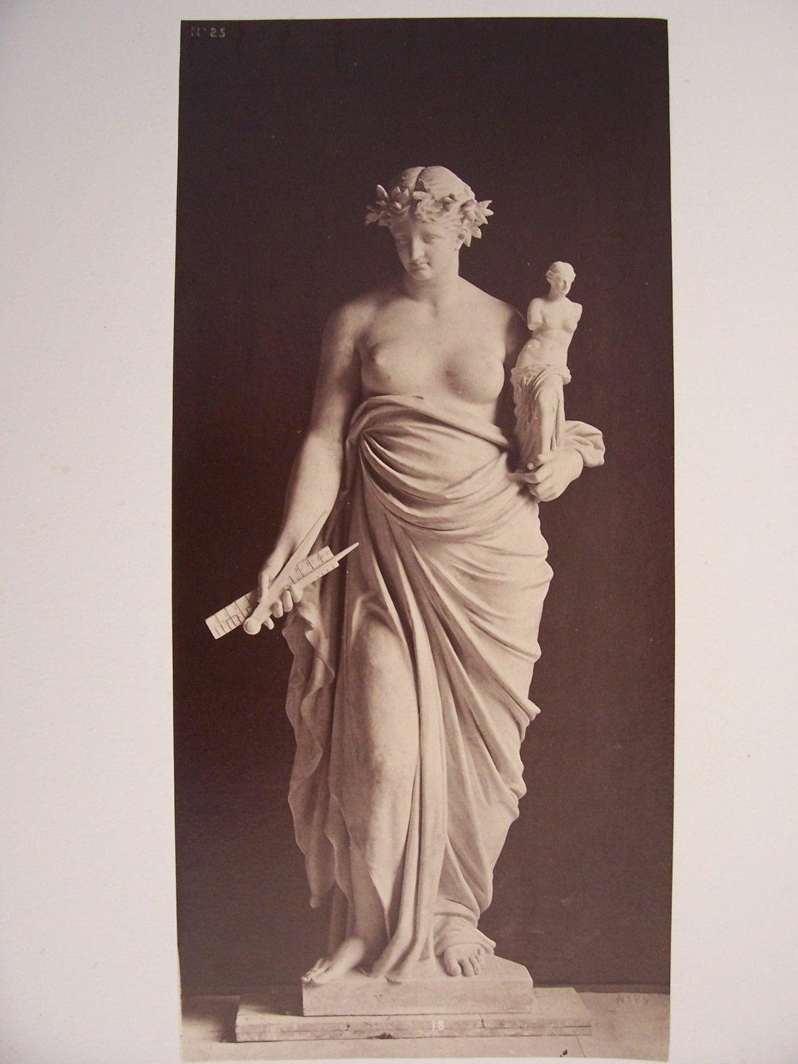 Le Nouvel Opéra de Paris. Statues décoratives (35 planches) Statues dans le Grand Foyer: Planche 25: La Tradition (par Cambos)